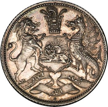 Kaçar-Türk hükümdarı Feth Ali şah dönemine ait İran parası. Sağ tarafında ejderha sembolüne yer verilmiştir.